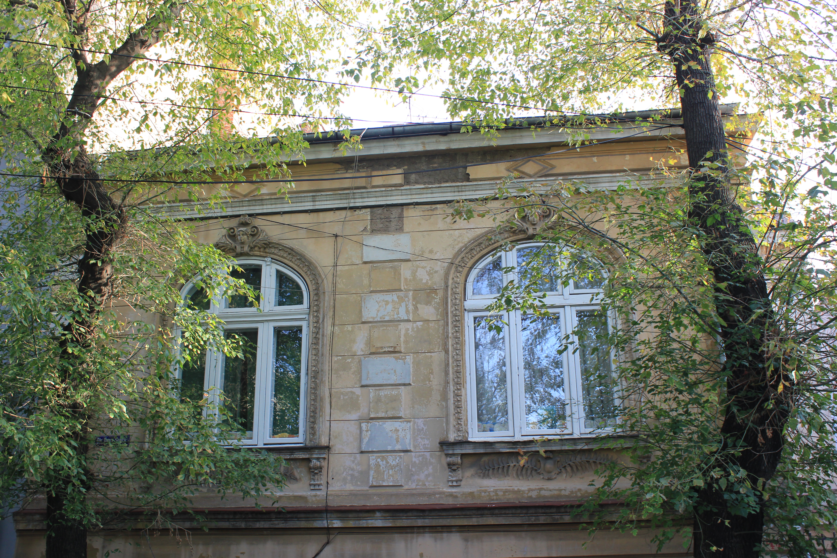 Casă Popa Soare 60